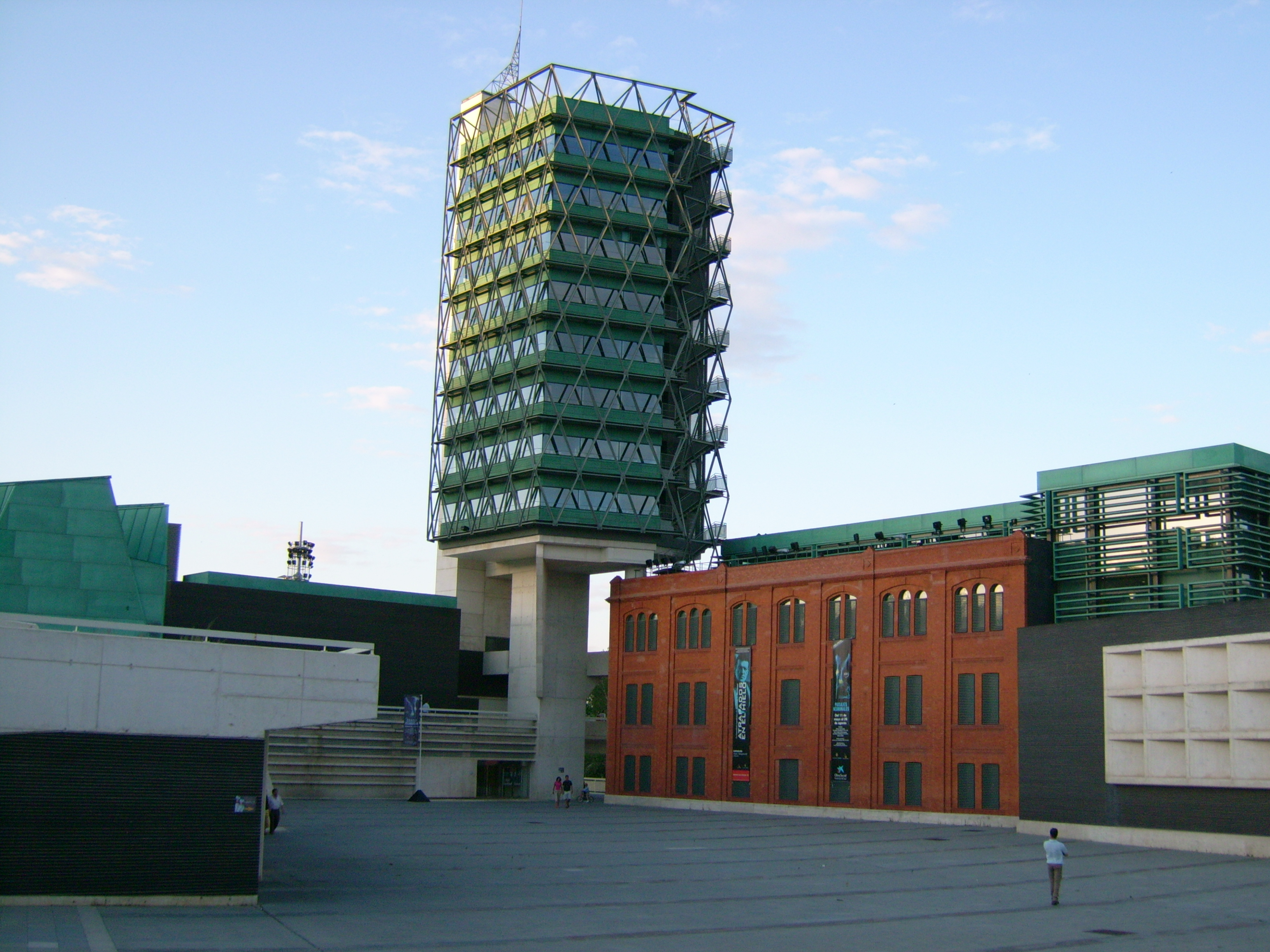 Museum of Science Museo de la Ciencia